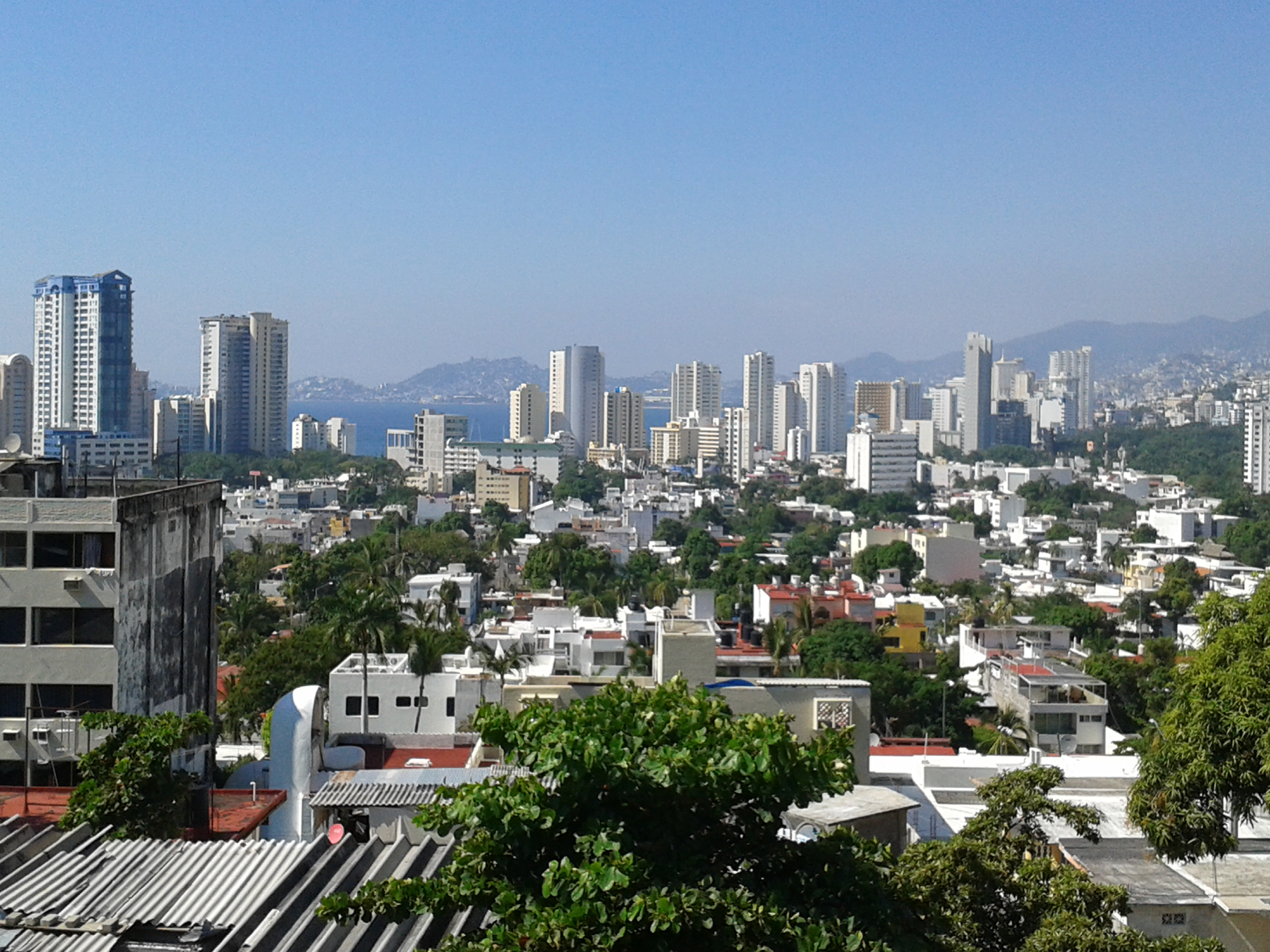 Hoteles en Acapulco desde Costa Azul